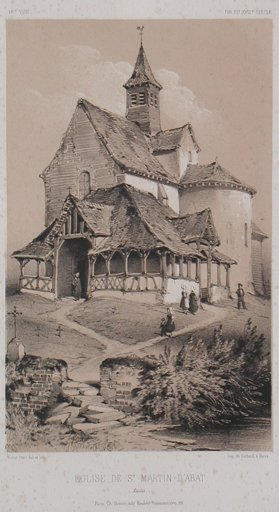 Estampe du XIXè siècle représentant l'église Saint-Martin de Saint-Martin-d'Abbat (Loiret, Centre, France)